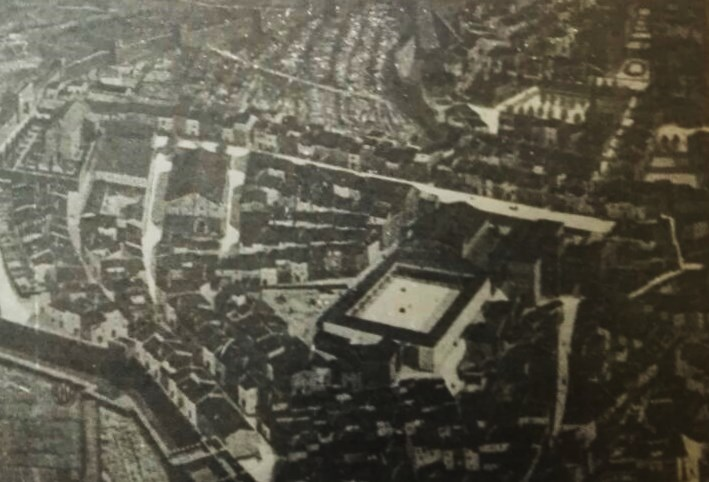 Situació del antic Convent